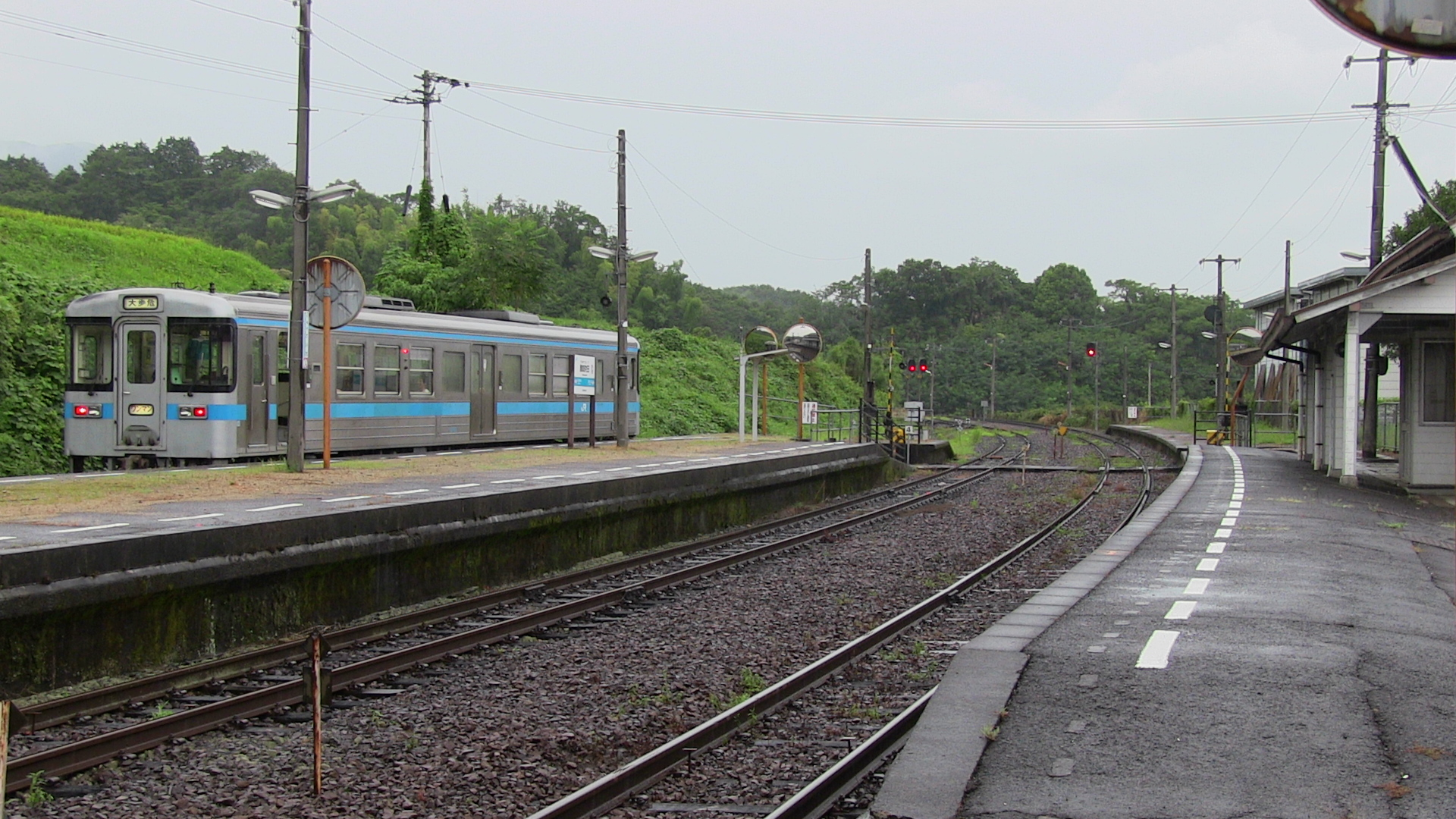 讃岐財田駅構内